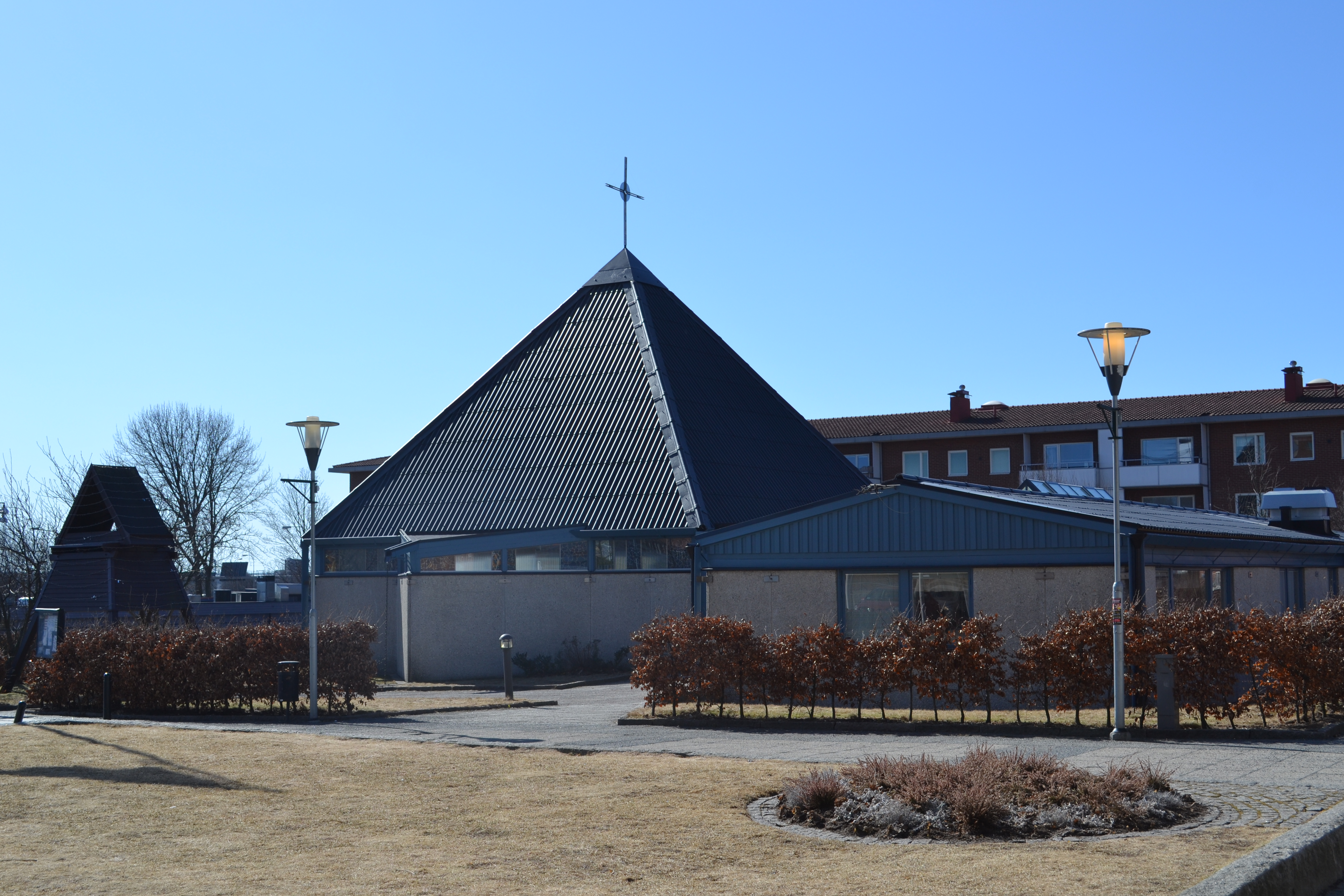 Göteborg.